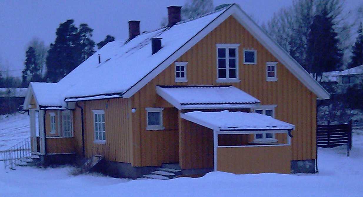 Gamle Nordby skole